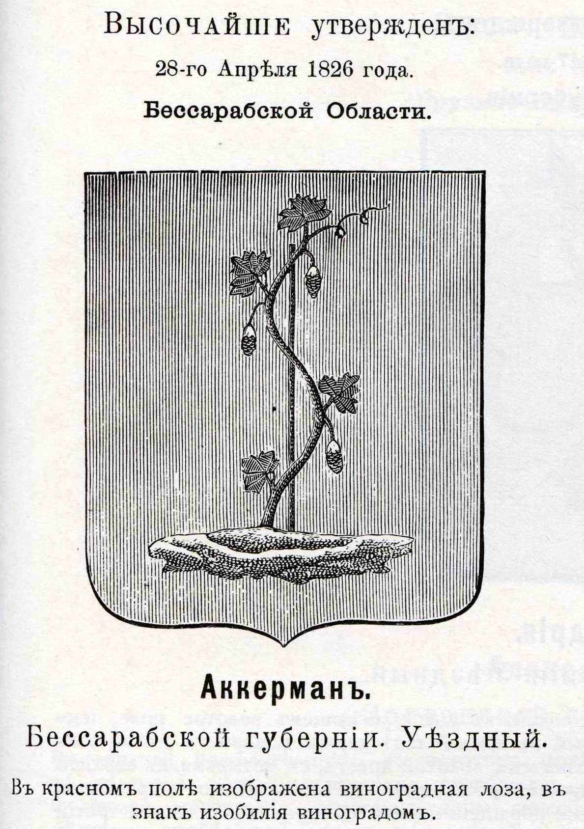 Official Russian Empire coat of arms Akkerman. Герб уездного города Российской Империи Аккерман (Белгород-Днестровский) Бессарабской губернии 1826 года с официальным описанием в Гербовнике Винклера.